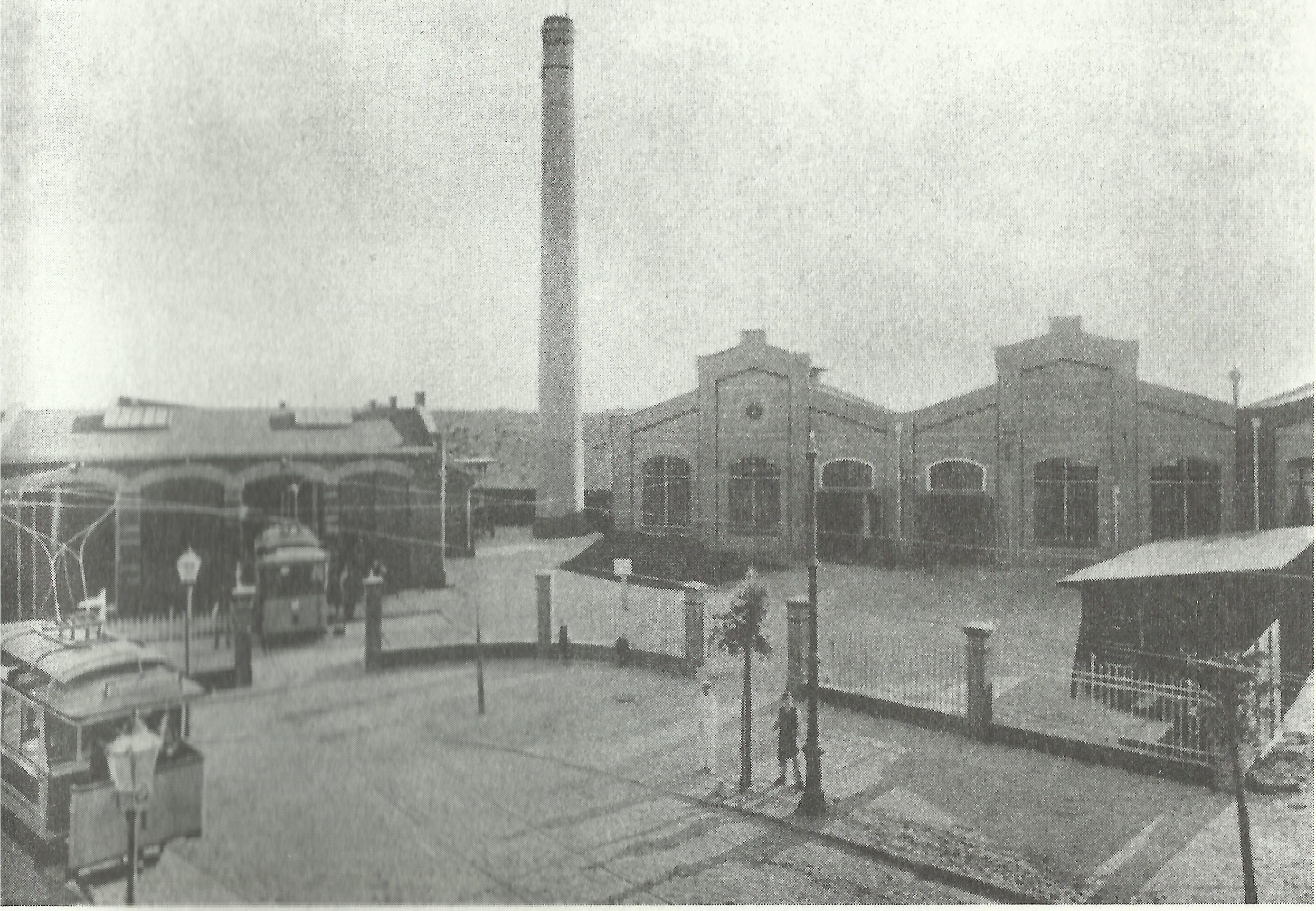 Betriebshof Brehmestraße der Berliner Elektrische Straßenbahn AG